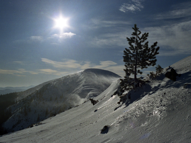 Драгобрат